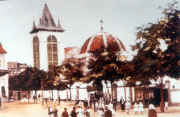 Kathedrale in Constantine, Algérien. Um 1910. Alte Postkartenansicht.